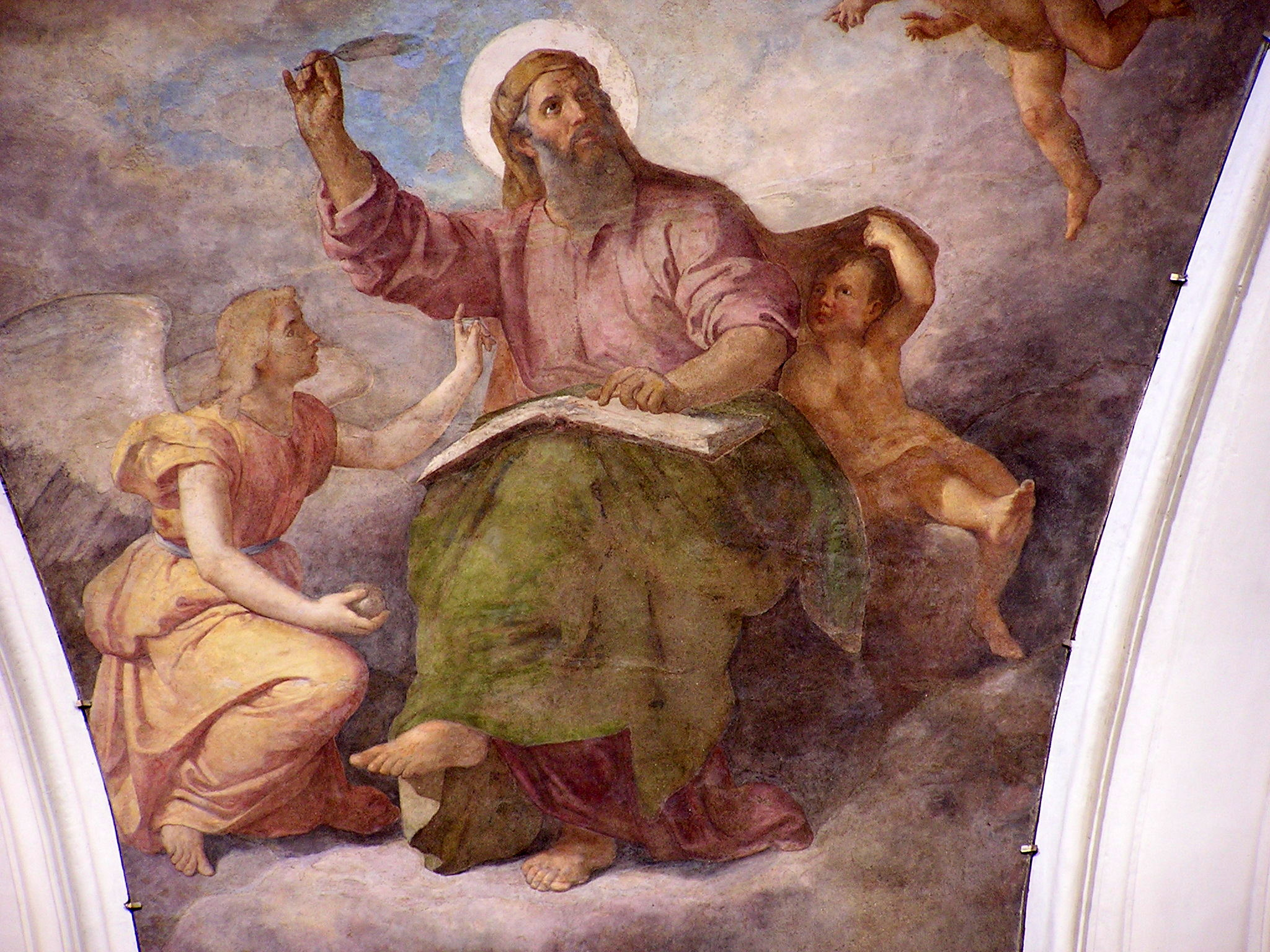 la foto raffigura un particolare di un affresco eseguito da Francesco Podesti sulle vele della cupola della Chiesa del SS. Sacramento, ad Ancona. Il dipinto rappresenta l'evangelista San Matteo. Nelle altre tre vele della cupola F. Podesti dipinse gli altri tre evangelisti. Il pittore al momento di eseguire questi affreschi aveva più di ottanta anni e perciò essi possono essere considerati come il suo testamento artistico.